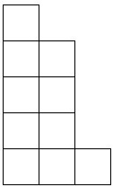 一个杨表的例子